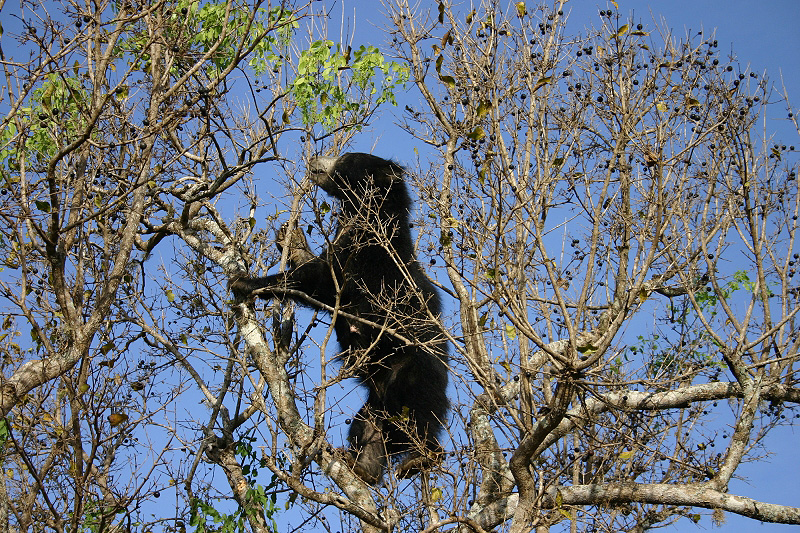 Melursus ursinus. Taken in Yala National Park, Sri Lanka. 7/21/04